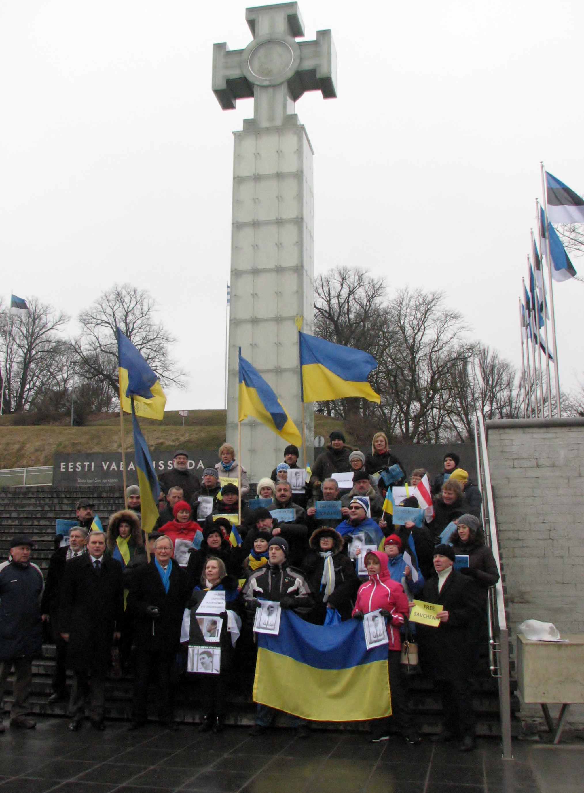 Miiting Vabaduse väljakul Venemaale vangi viidud Ukraina naispiloodi Nadija Savtšenko toetuseks